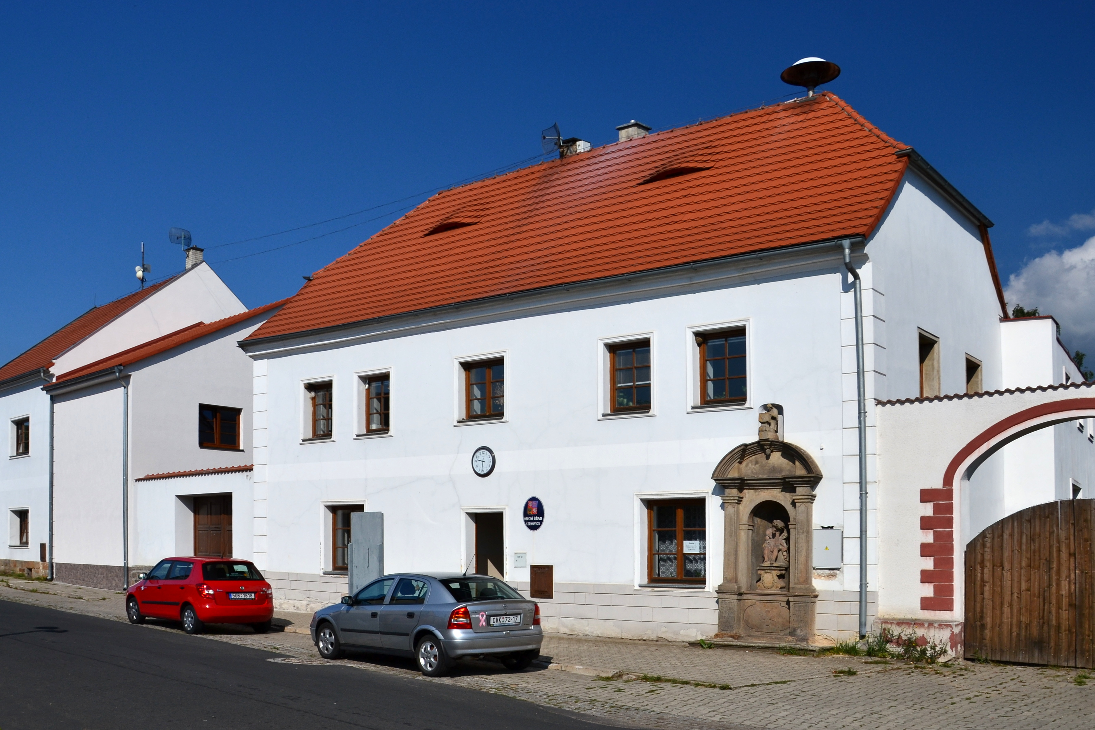 Měšťanský dům (Černovice), Černovice 80